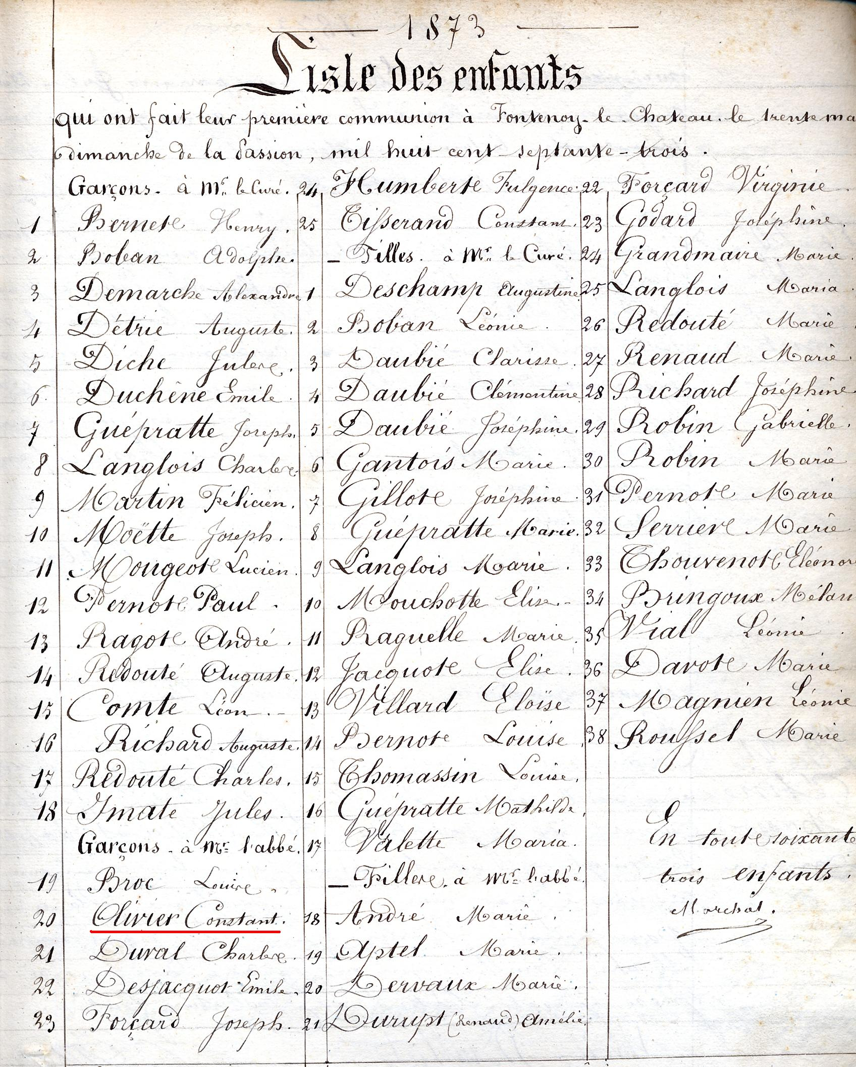 Relevé de registres paroissiaux XIXè